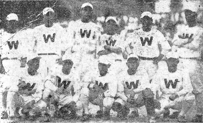 1923년 전국체육대회 야구(제4회 전조선야구대회) 중학부에서 우승한 휘문고등보통학교 선수단의 모습.